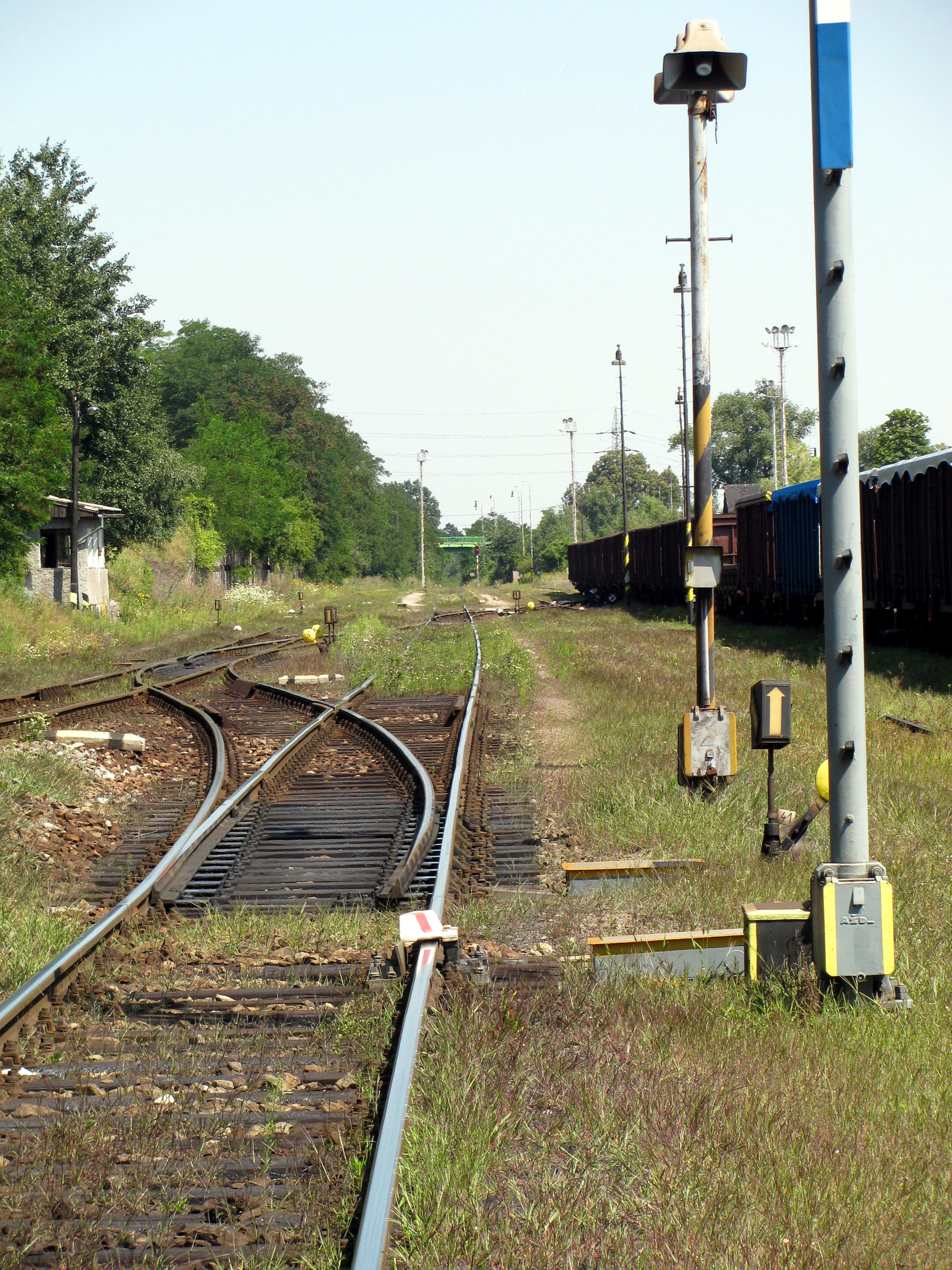 Žst. Kladno-Dubí, pohled po koleji vedoucí kdysi ze Starého Kladna ke Kralupům. Nyní jde o vlečku a kolej je opatřena výkolejkou, směrem Kladno se odjíždí přes výhybky na obrázku vlevo.